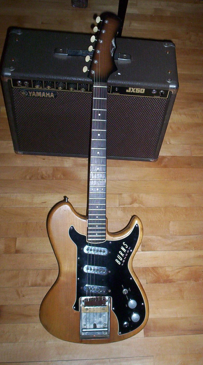 Burns Vista Sonic guitar, 1962. rear: Yamaha JX50 guitar amplifier, 1970s